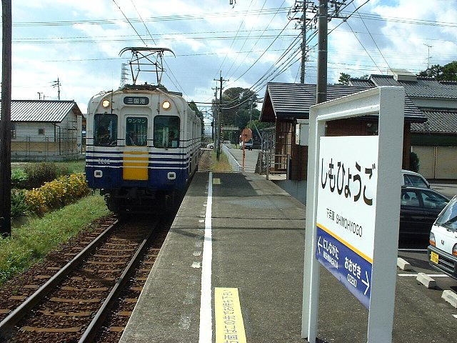 えちぜん鉄道三国芦原線 下兵庫駅 2003年10月 Bakkai撮影